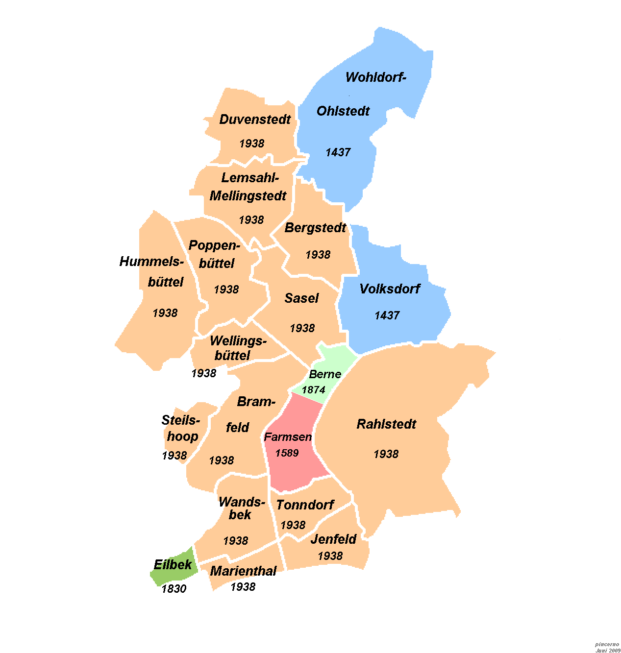 Bezirk Wandsbek: Zeitpunkt der Zugehörigkeit der einzelnen Stadtteile zu Hamburg. Die Walddörfer Wohldorf-Ohlstedt und Volksdorf gehörten schon recht früh, nämlich 1437, zu Hamburg. Das Walddorf Farmsen folgte 1589. Eilbek stieß 1830 hinzu und Berne 1874. Die restlichen 13 Dörfer bzw. Orte, also der weitaus größere Teil des Bezirks, trat 1938 im Rahmen des Groß-Hamburg-Gesetzes dem Staatsgebiet bei.